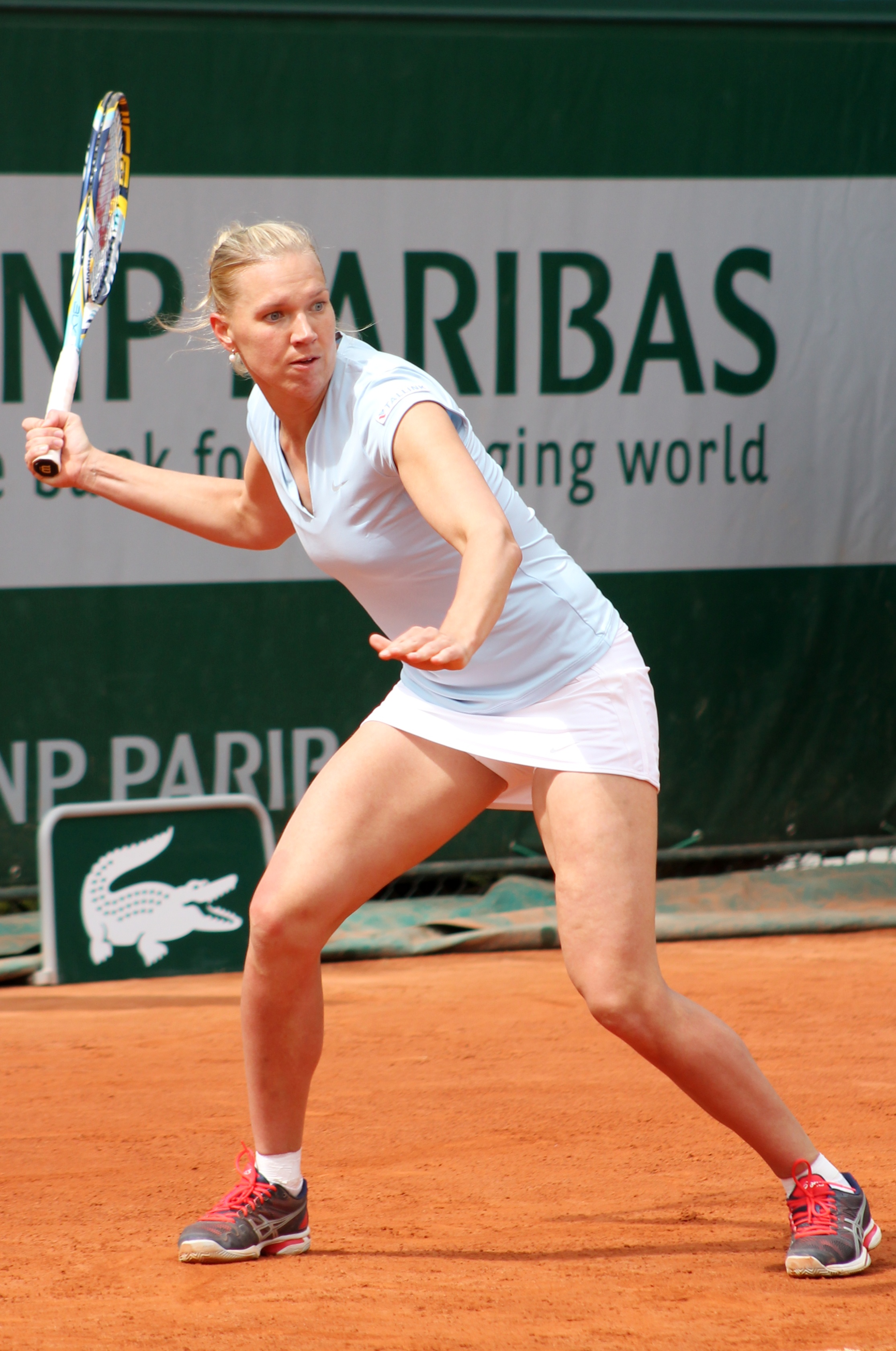 Kanepi RG13 (9)